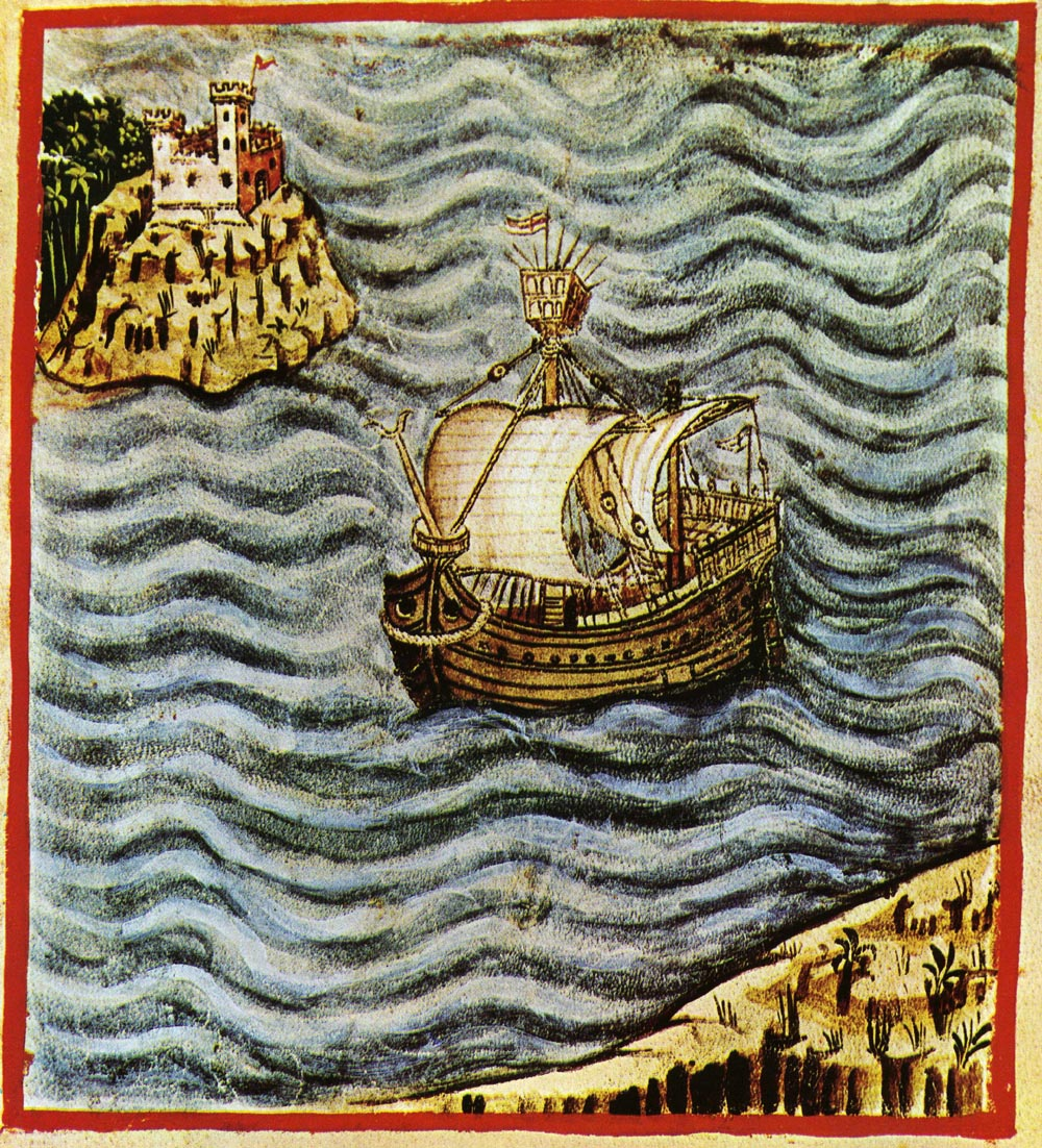 Tacuina sanitatis (XIV century) 3-alimenti, acqua salata, Taccuino Sanitatis, Casanatense 4